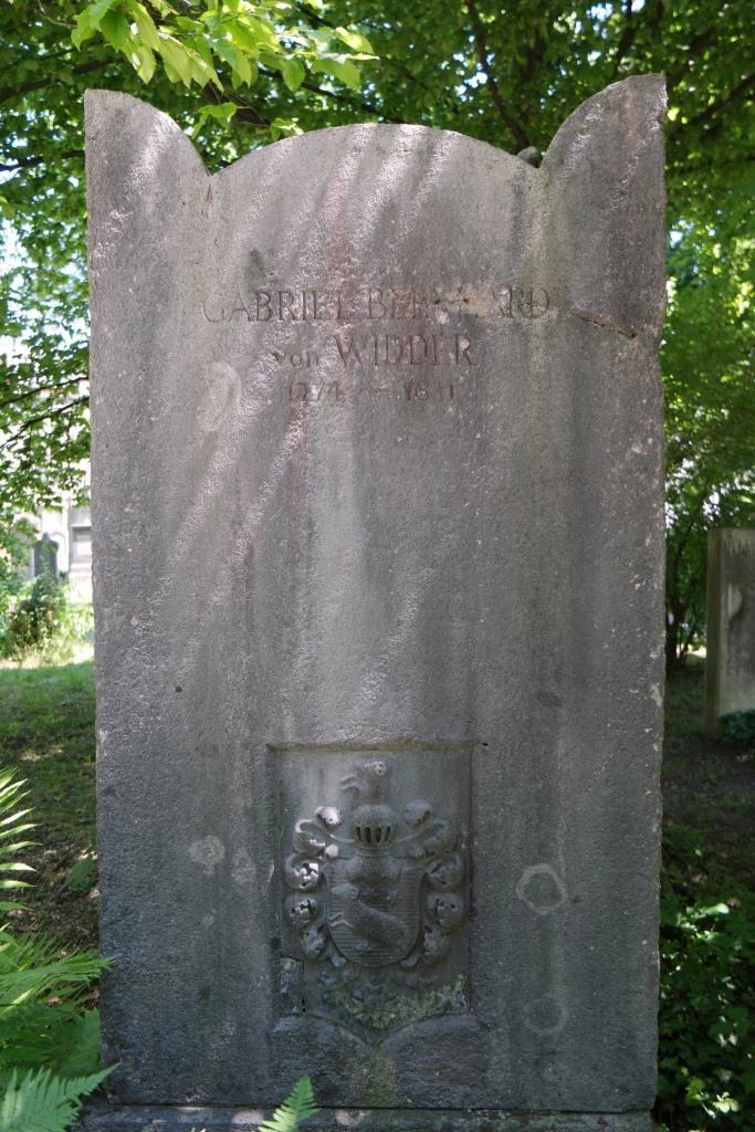 Grab des Verwaltungsbeamten Gabriel von Widder (1774-1831) auf dem Alten Südlichen Friedhof in München